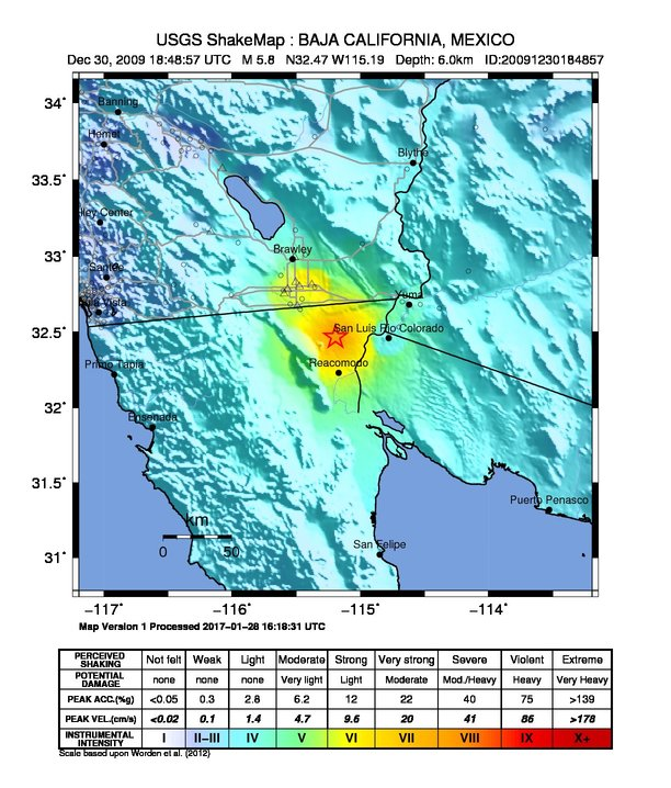 Terremoto del Valle de Mexicali (Miercoles, 30 de Diciembre del 2009)